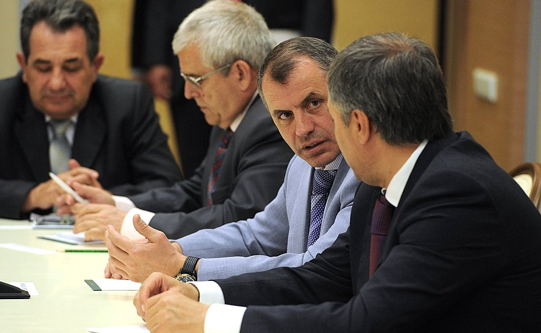 Перед началом встречи с представителями крымско-татарской общины. Слева направо: профессор, доктор медицинских наук Дилявер Акмаллаев, председатель Совета народной партии Милли Фирка Васви Абдураимов, председатель Государственного совета Республики Крым Владимир Константинов и первый заместитель руководителя Администрации Президента Вячеслав Володин